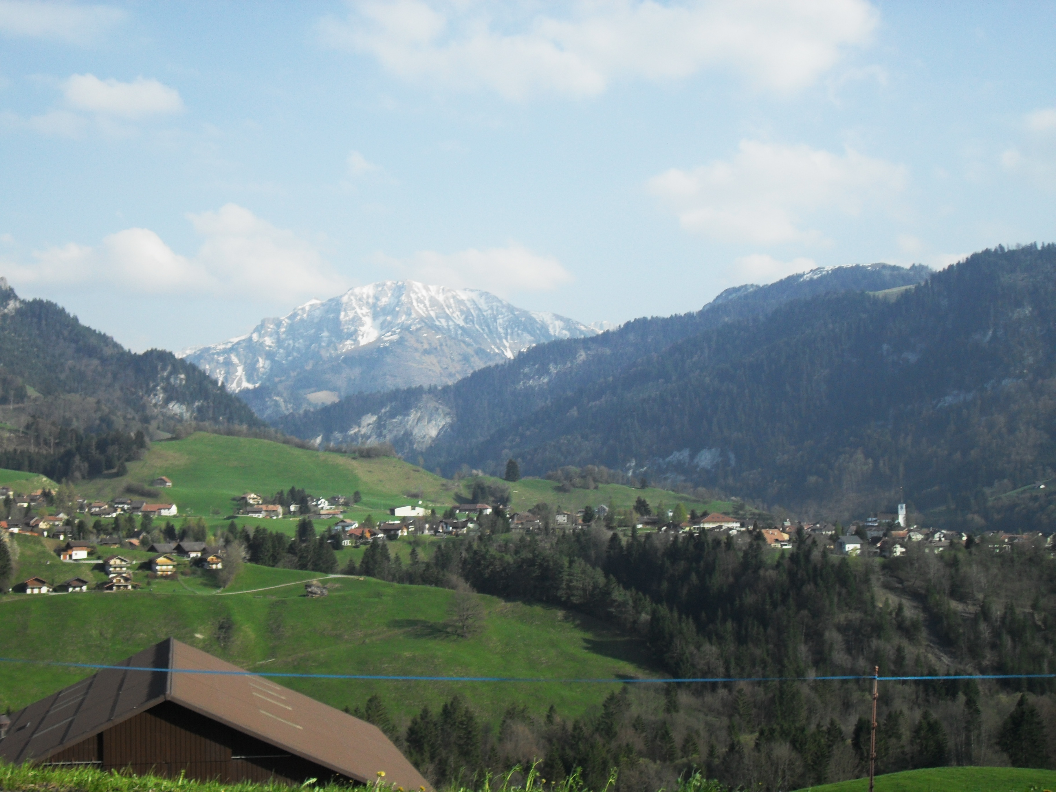 Blick auf Cerniat FR